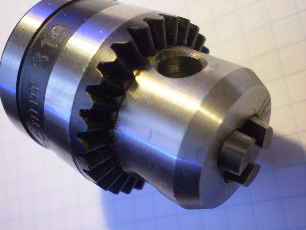 Small drill chuck